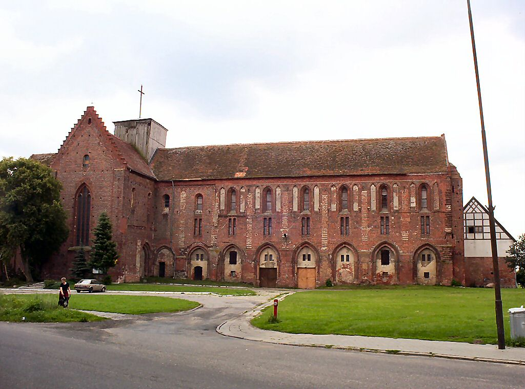 Kołbacz - kościół